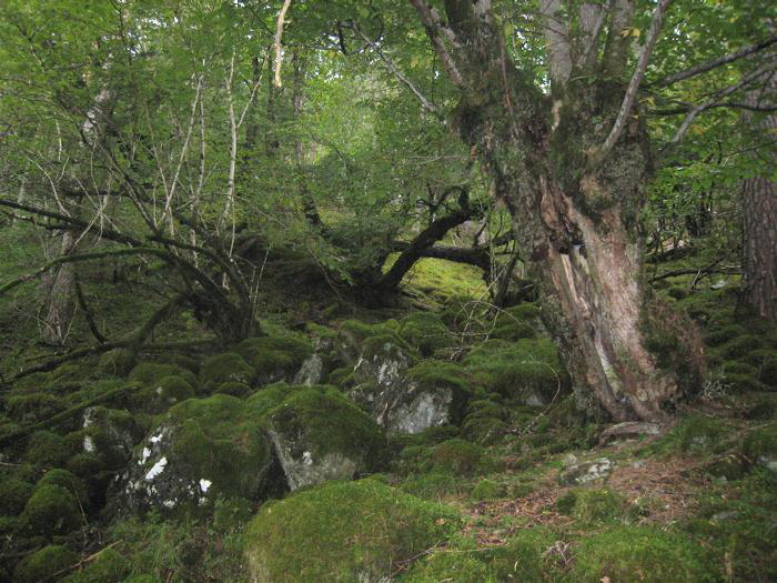 urskog